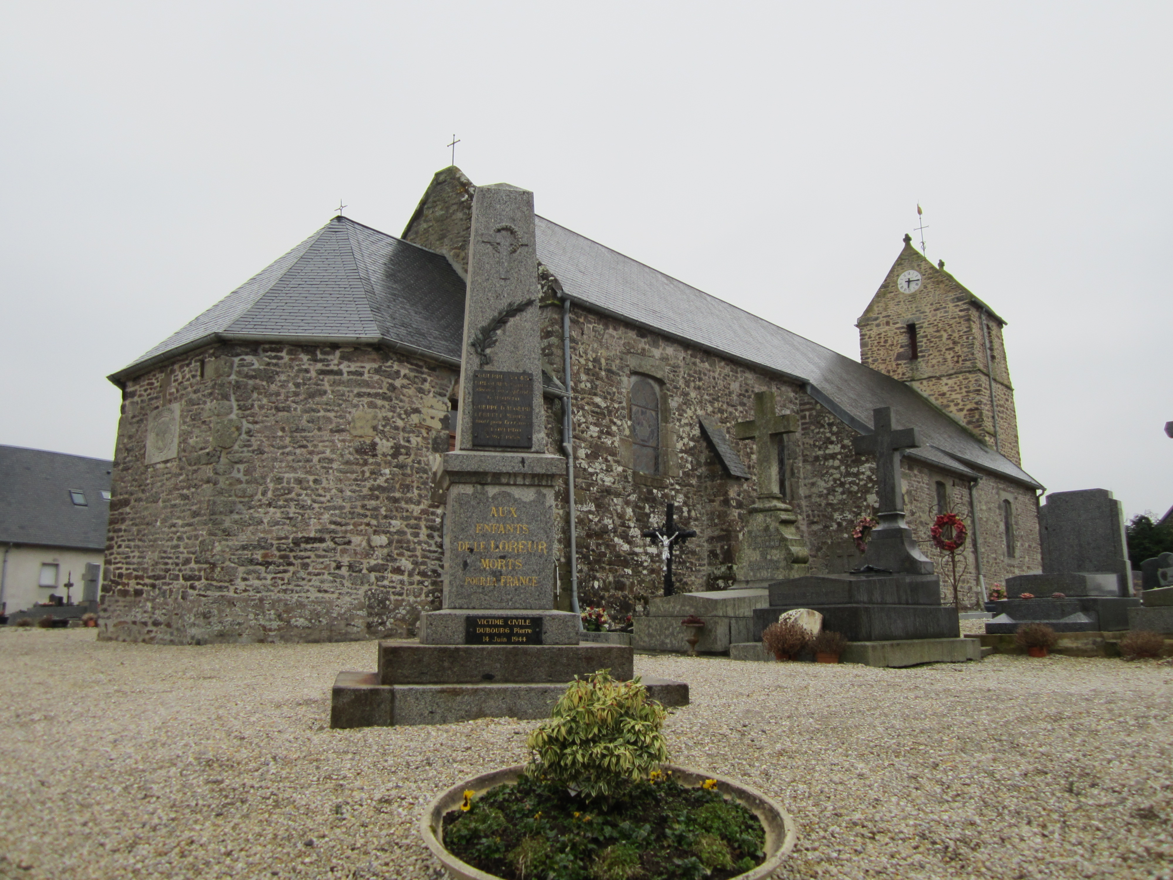 Église Notre-Dame du Lorreur